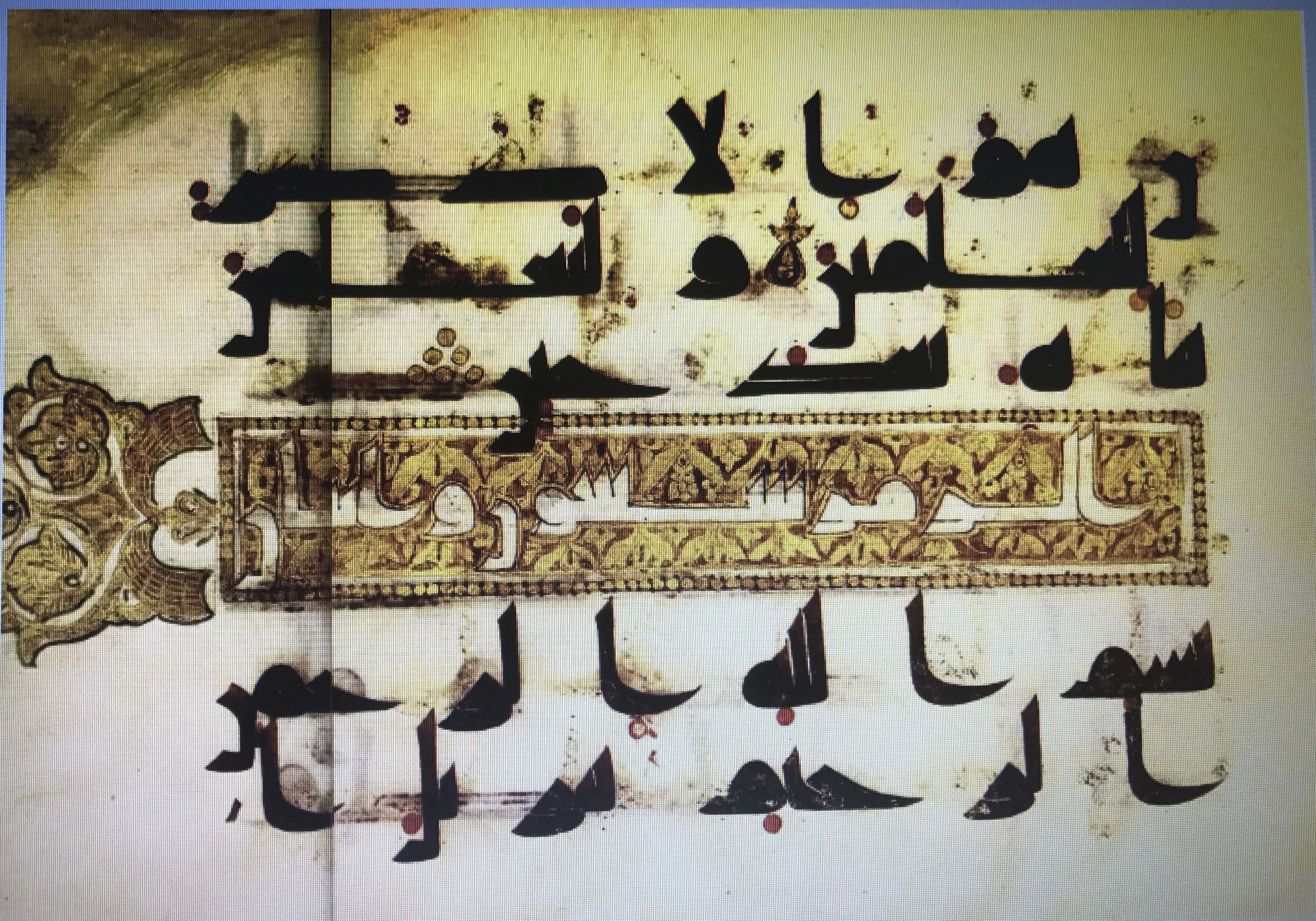 Pagină din Coran